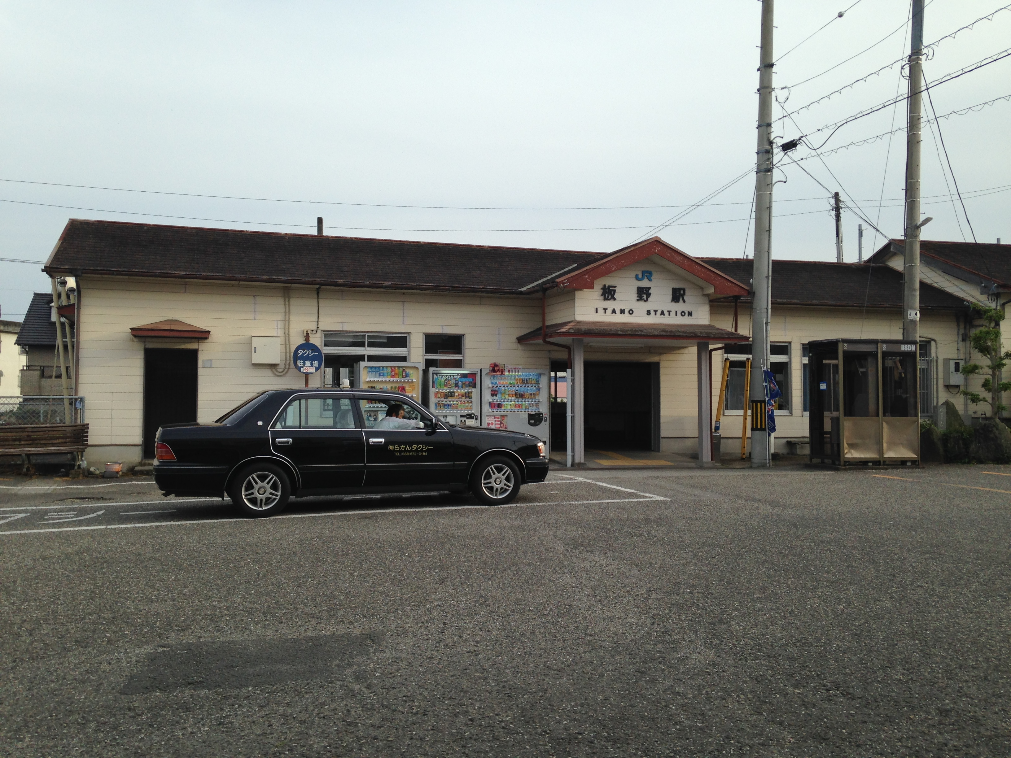 板野駅駅舎